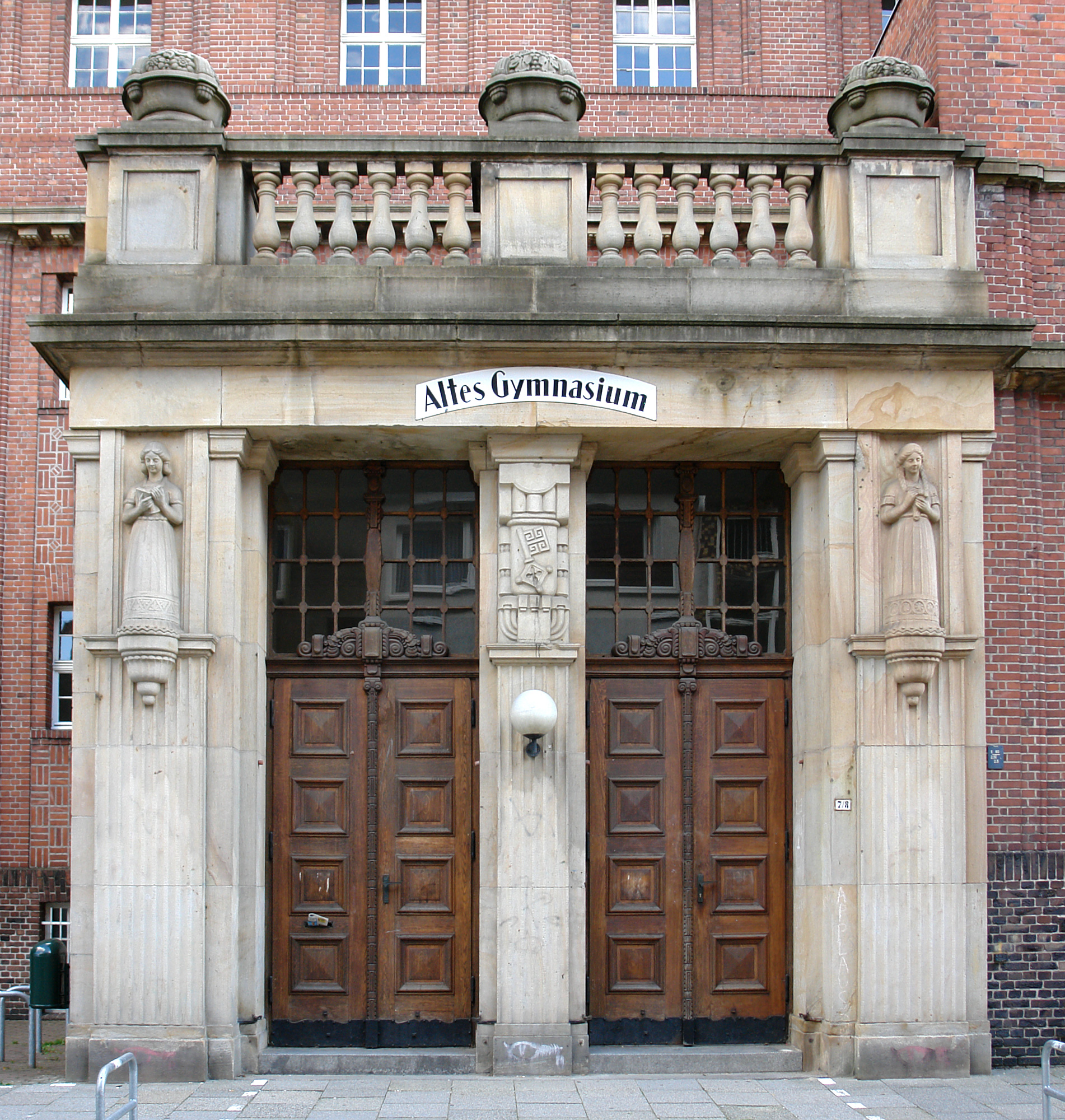 Lyzeum Kleine Helle in Bremen, Kleine Helle 7, 8, 9 - PortalDas abgebildete Objekt ist ein geschütztes Kulturdenkmal in der Freien Hansestadt Bremen, mit der Nr. 0678 beim Landesamt für Denkmalpflege registriert.